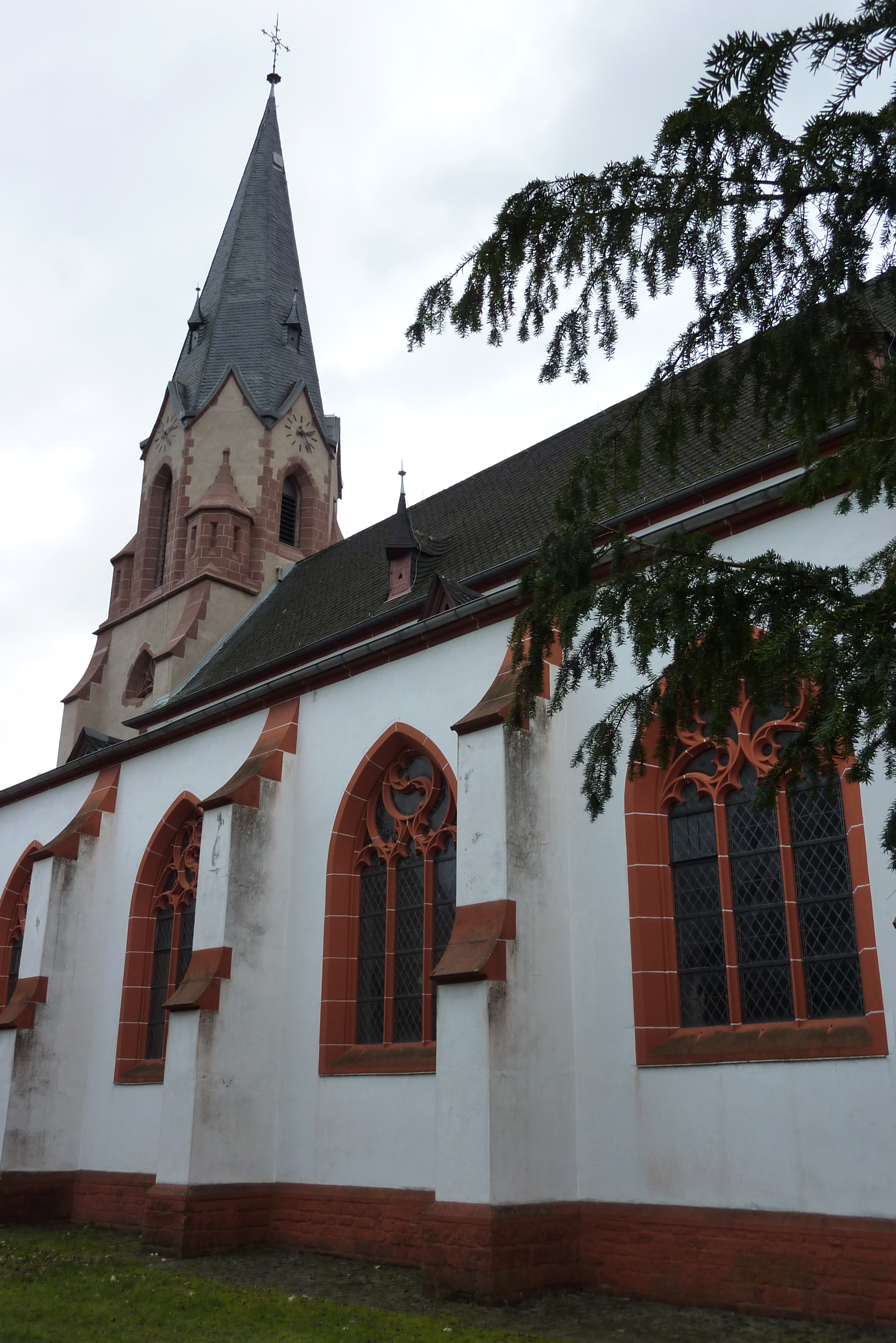 katholische Pfarrkirche St. Quirinus in Bengel, Außenansicht